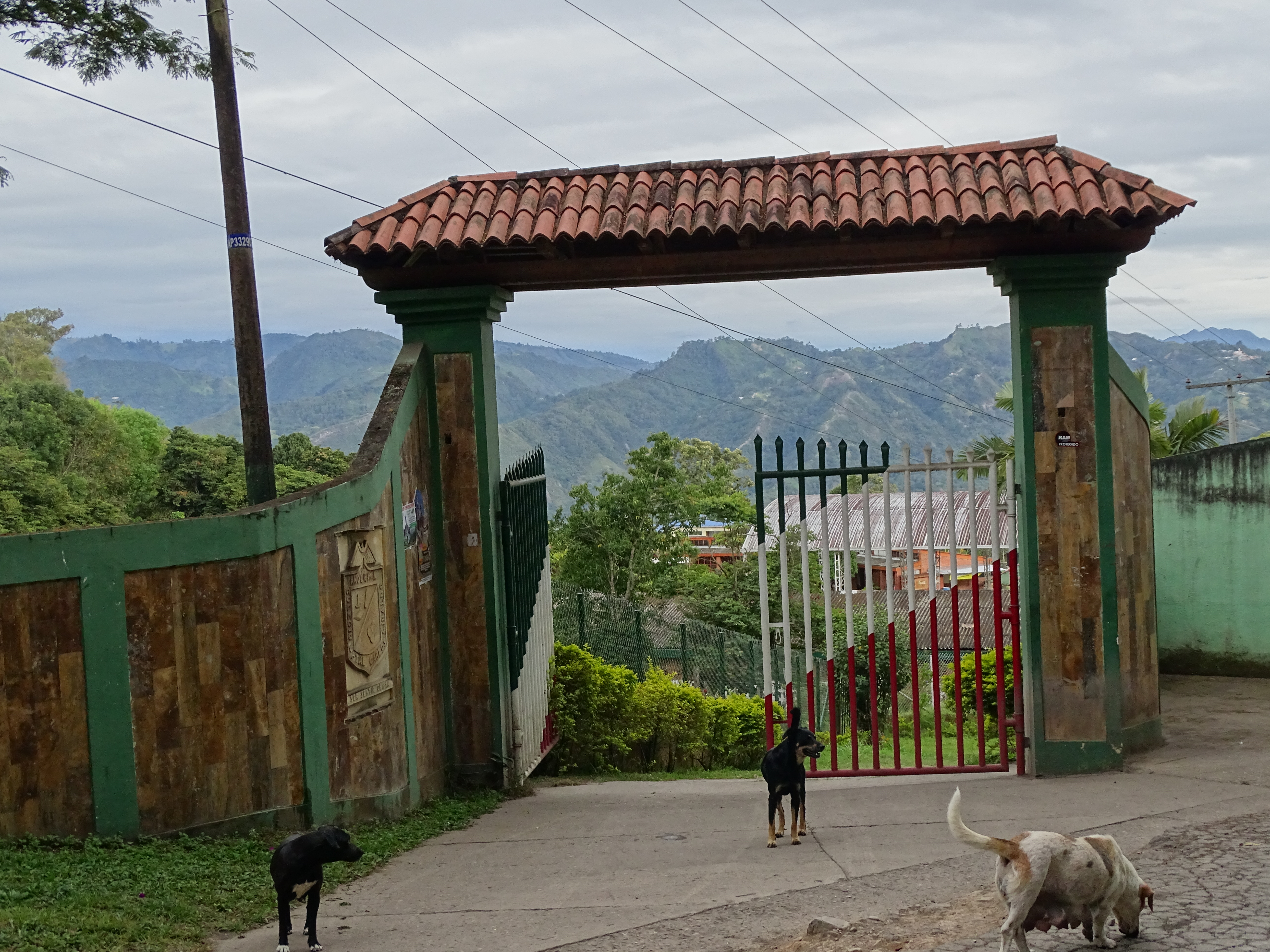 Puerta de entrada a la IED Carlos Giraldo